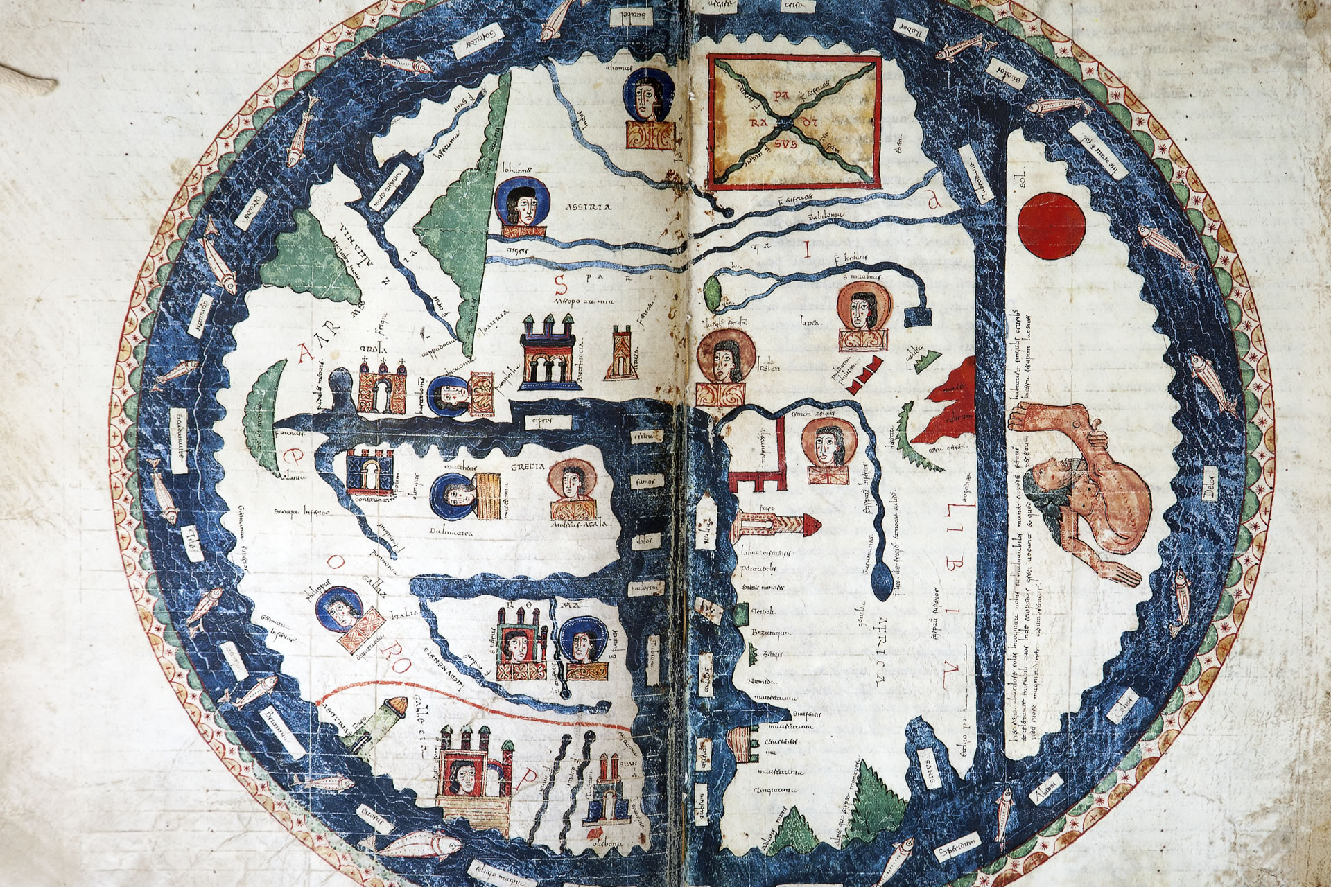 Copia del Museo de la Catedral de El Burgo de Osma del mapa de los Comentarios al Apocalipsis de San Juan del Beato de Liébana.